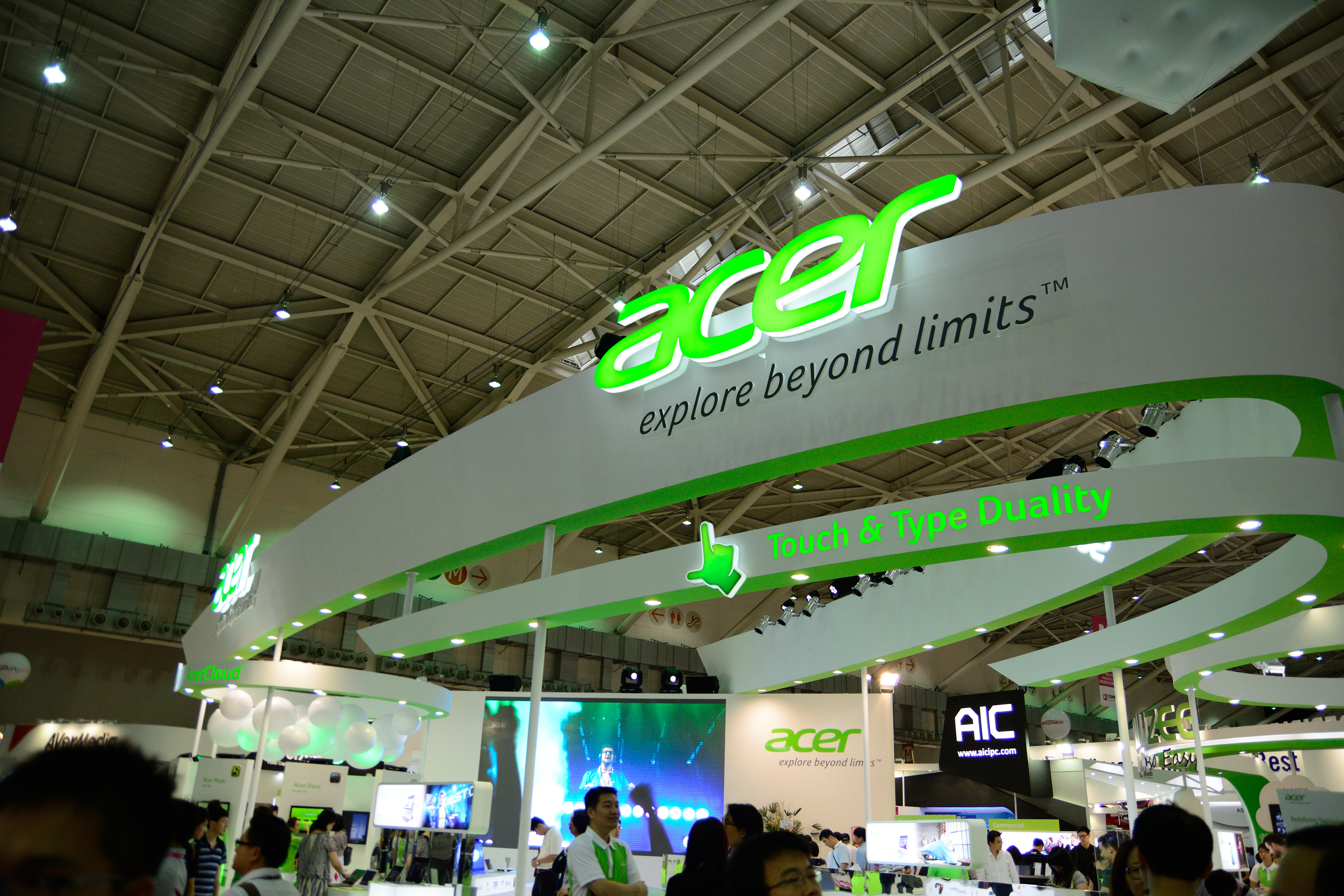 2013台北國際電腦展覽會，宏碁攤位。